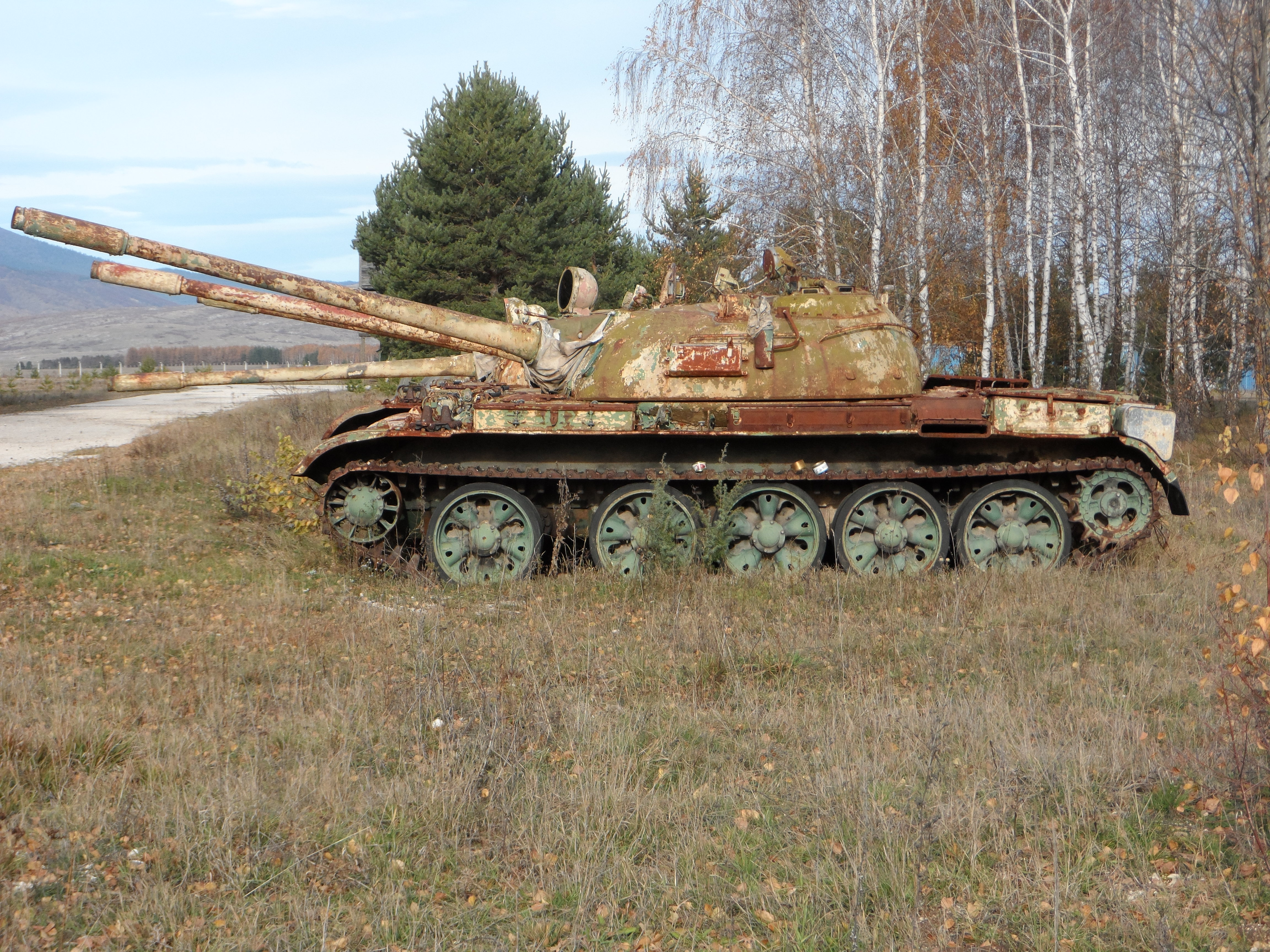 T-55 Tank of former VRS